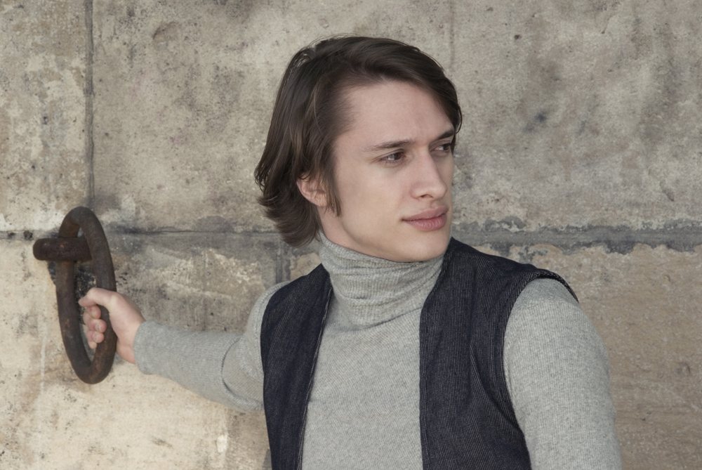 Col roulé, test photo mode, Mannequin de chez Marilyn Angecy, styliste Miroslav Sabo